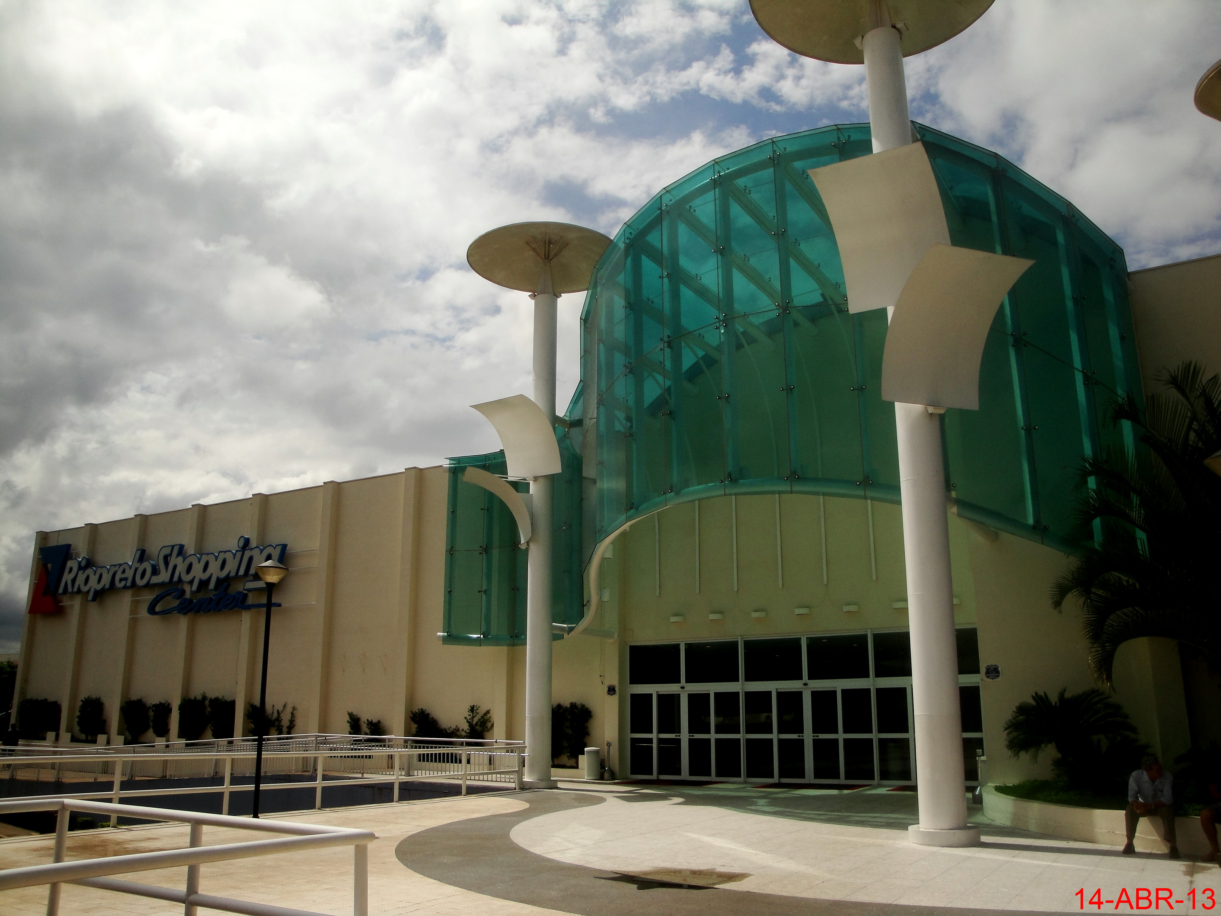 Riopreto Shopping Center. Entrada da Avenida Brigadeiro Faria Lima, Bairro Jardim Morumbi